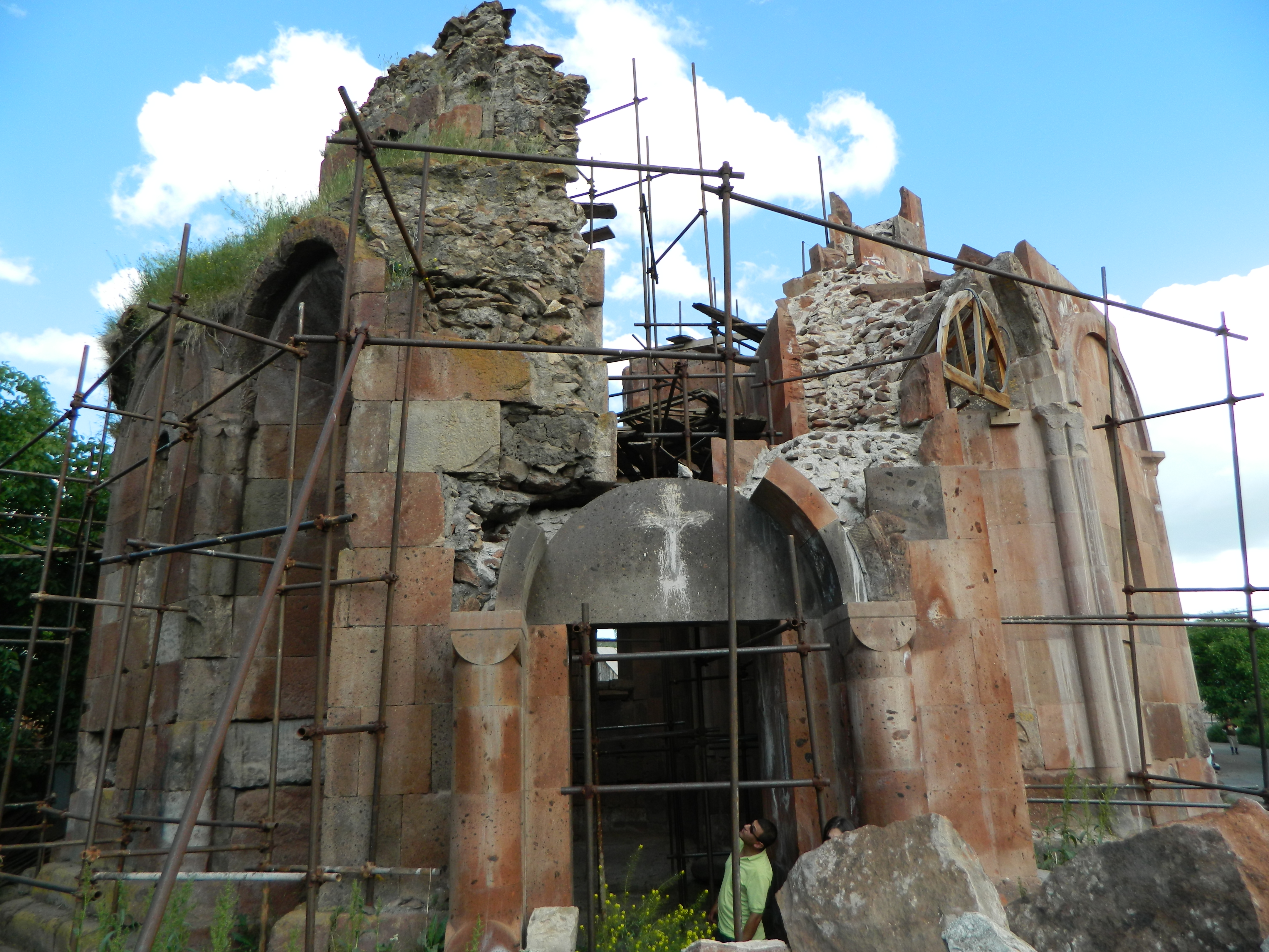 Սուրբ Գևորգ եկեղեցի, 7–րդ դար 48/2